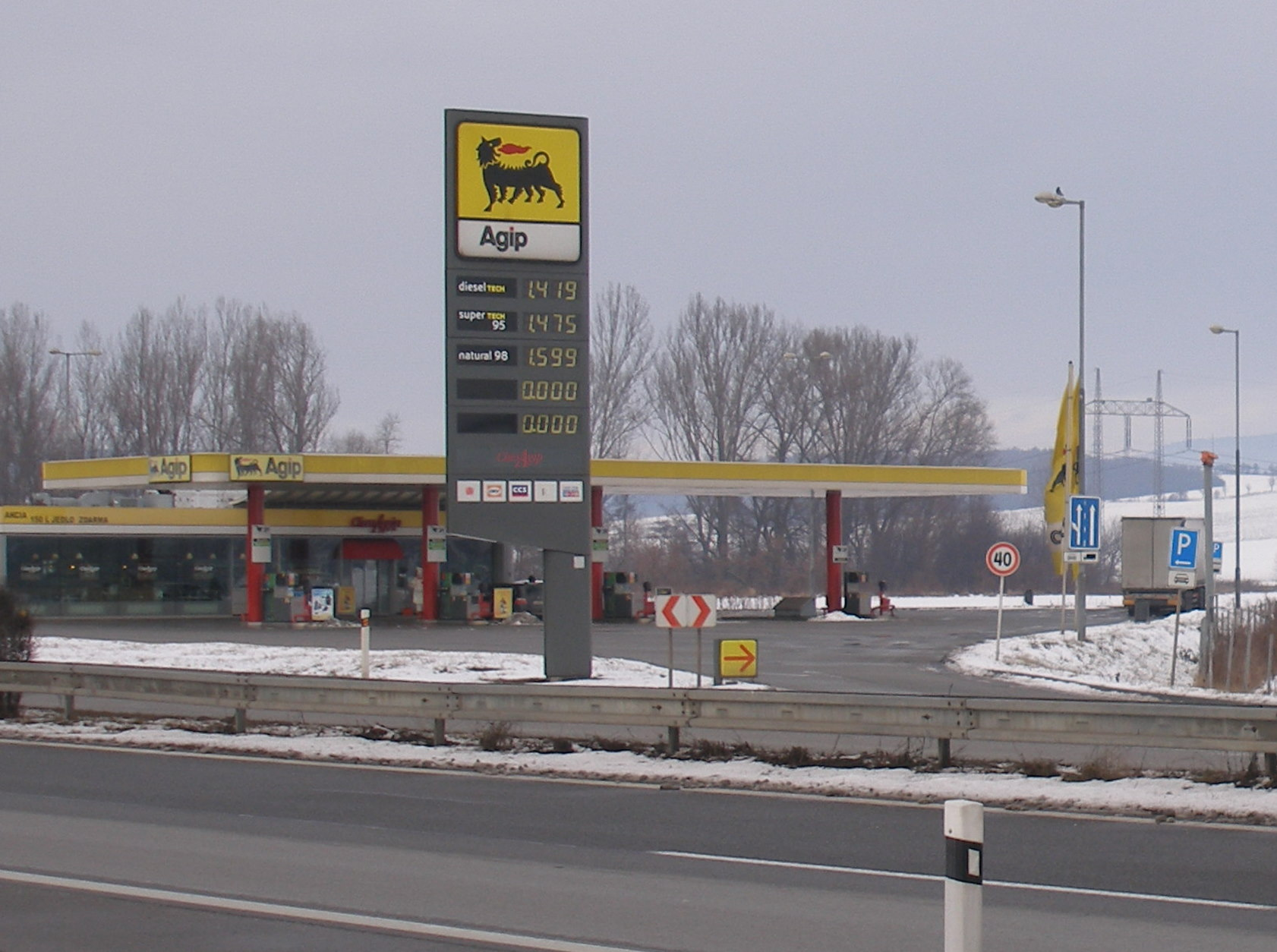 Čerpacia stanica Janovík na diaľnici D 1 smer Košice-Prešov